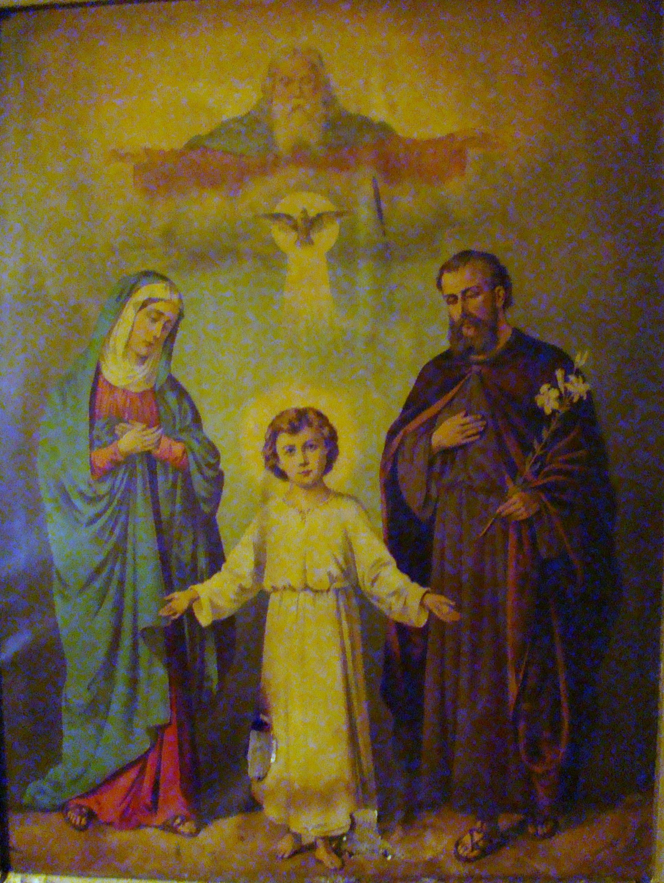 Biserica de lemn „Adormirea Maicii Domnului”,sat STĂNIJA; comuna BUCEŞ